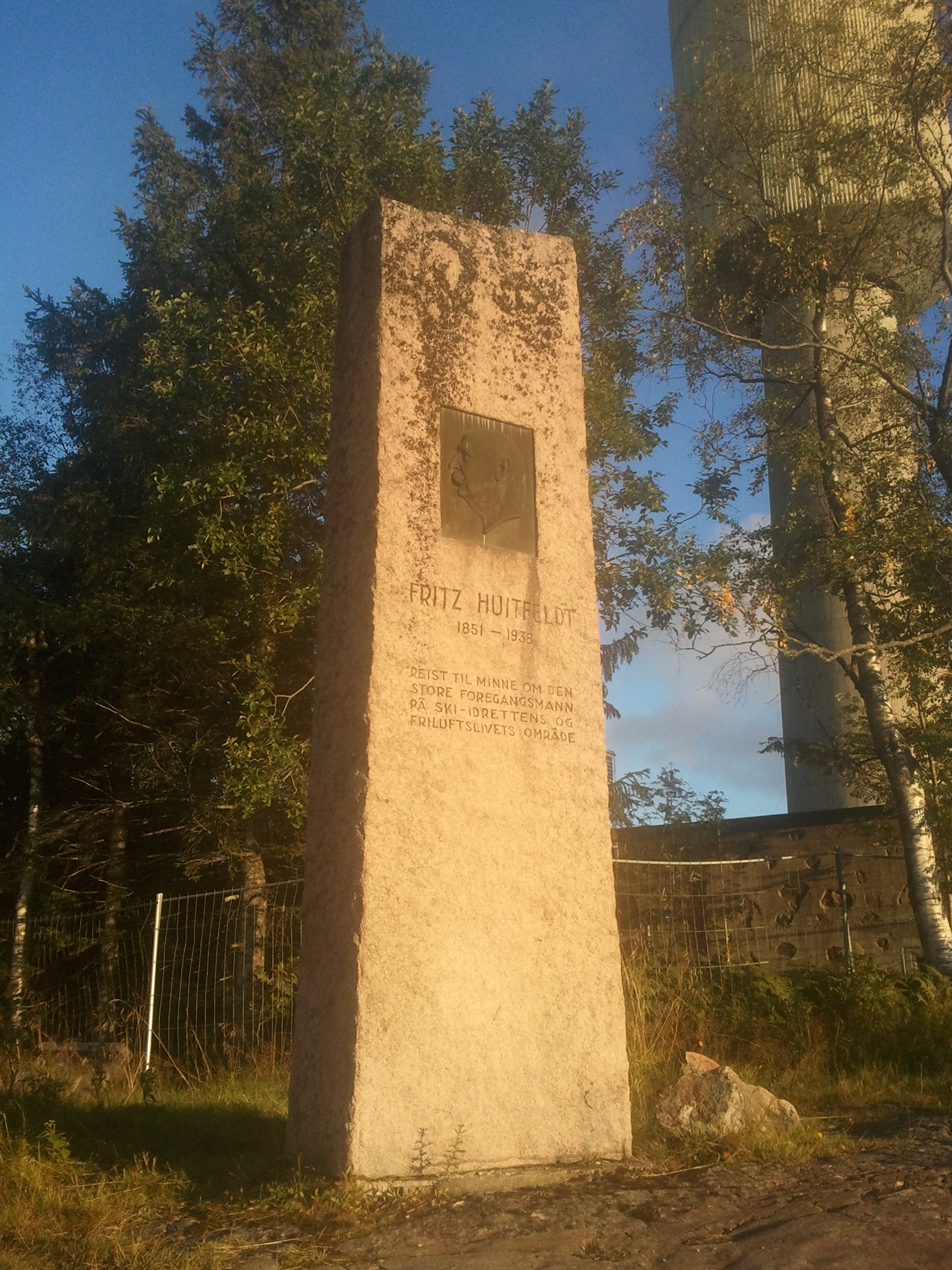 Bauta over Fritz Huitfeldt, på Tryvannshøgda i Oslo